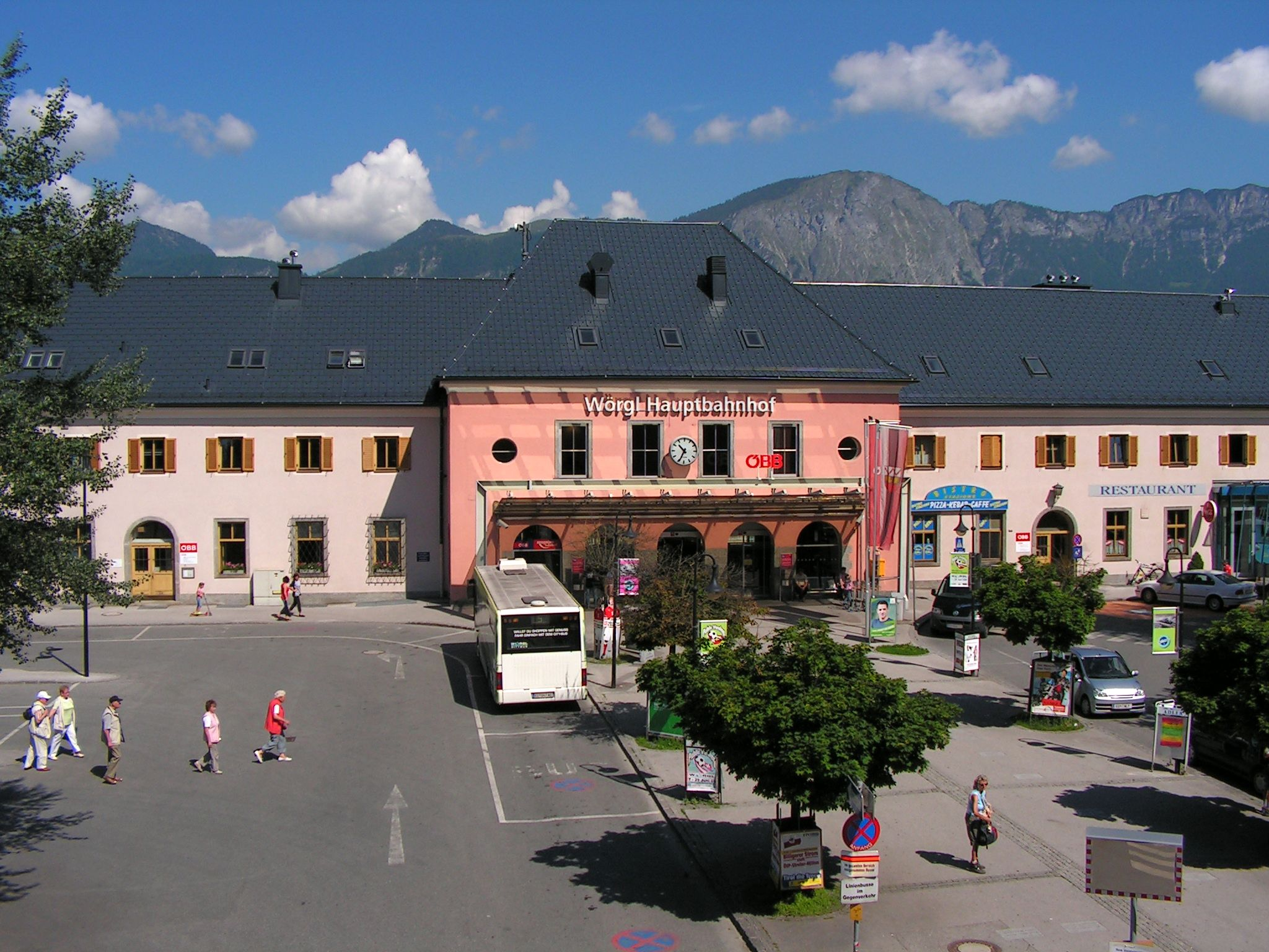 Das Aufnahmegebäude des Hauptbahnhofs von Wörgl von der Stadt aus gesehen